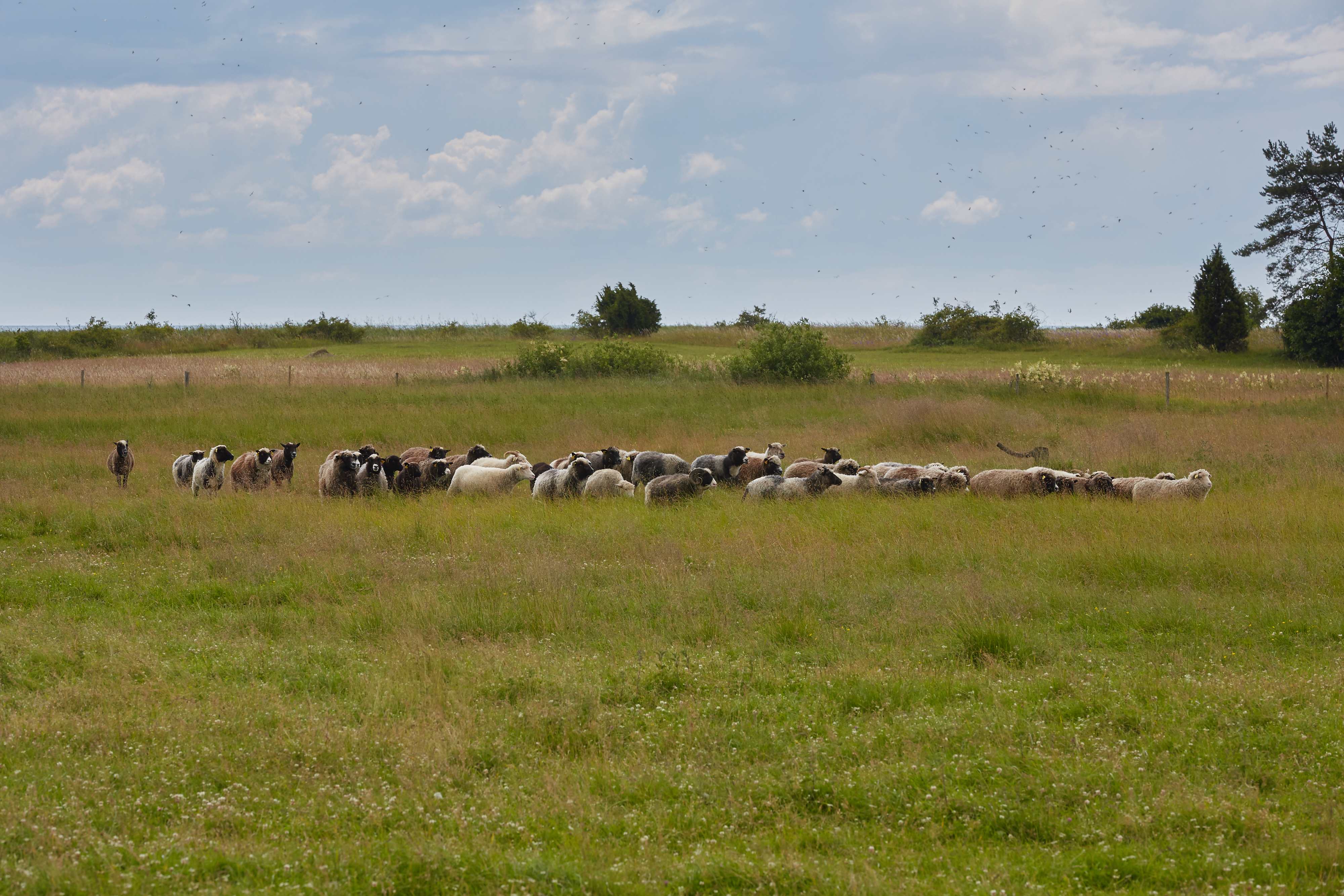 Manilaid 2015. aasta suvel